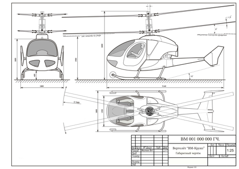 Габаритный чертёж вертолёта "VM-Cruise"